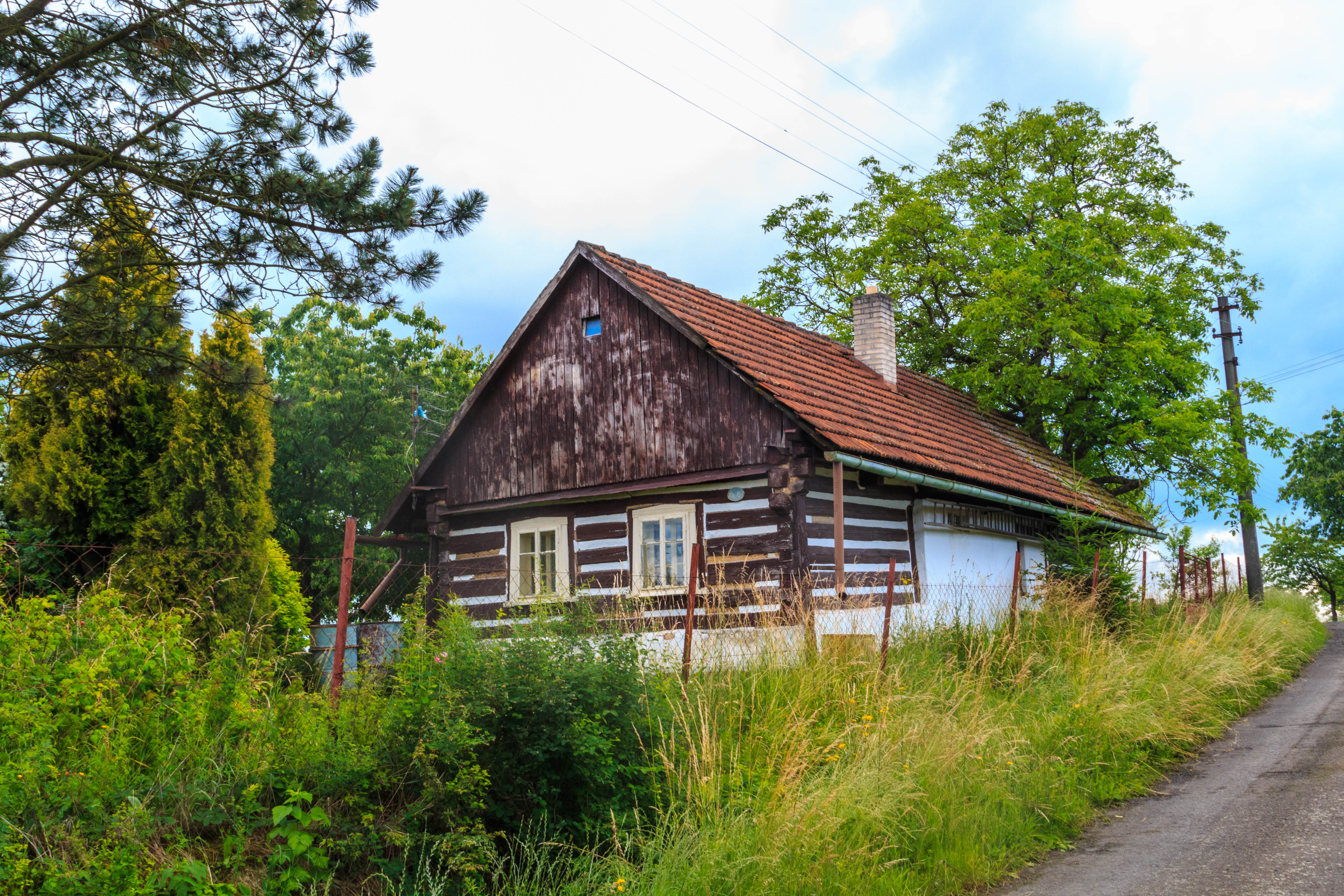 Těšín (Železnice) čp. 6